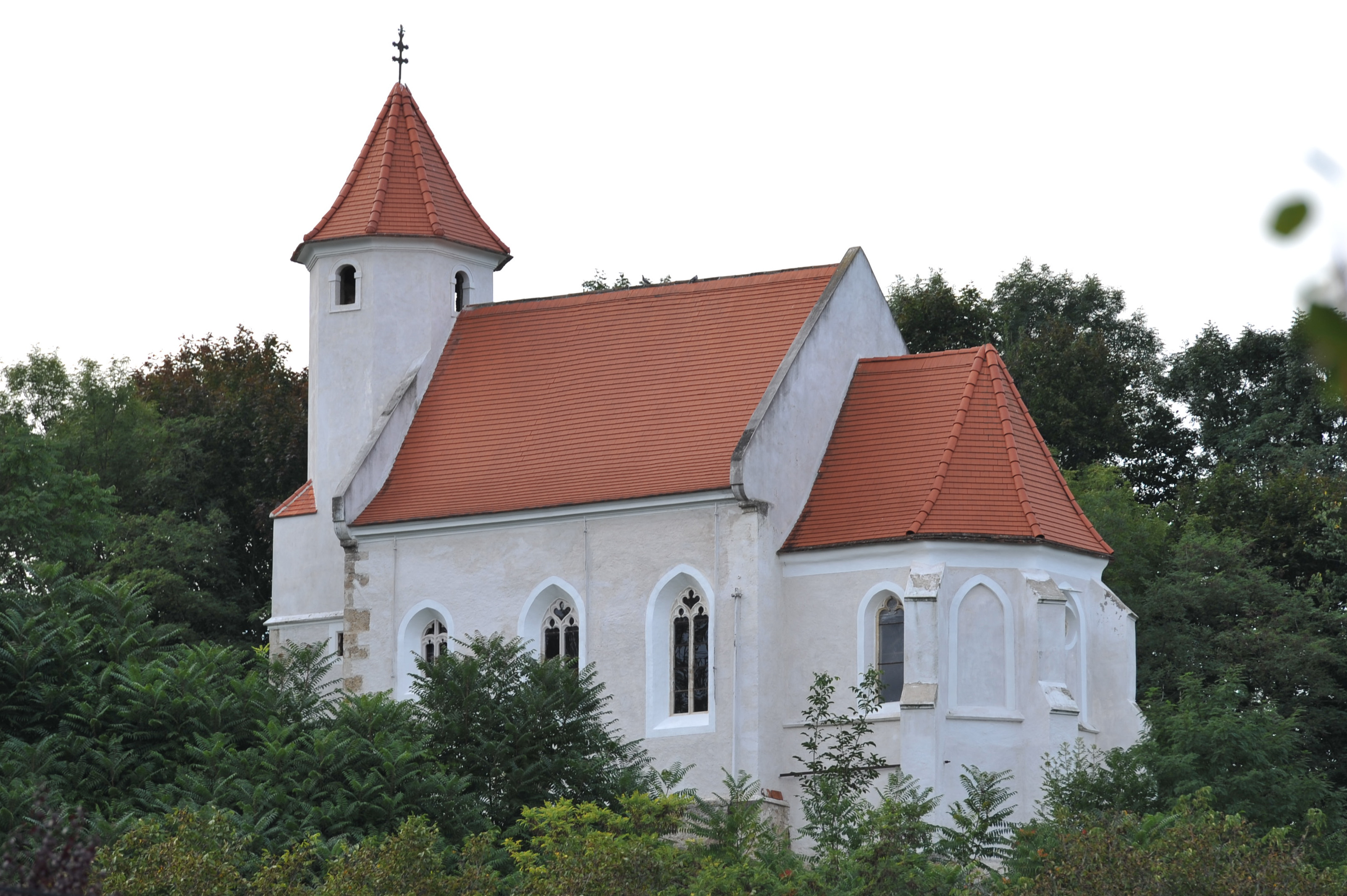 Schloss Viehofen The making of this work was supported by Wikimedia Austria. For other files made with the support of Wikimedia Austria, please see the category Supported by Wikimedia Österreich.